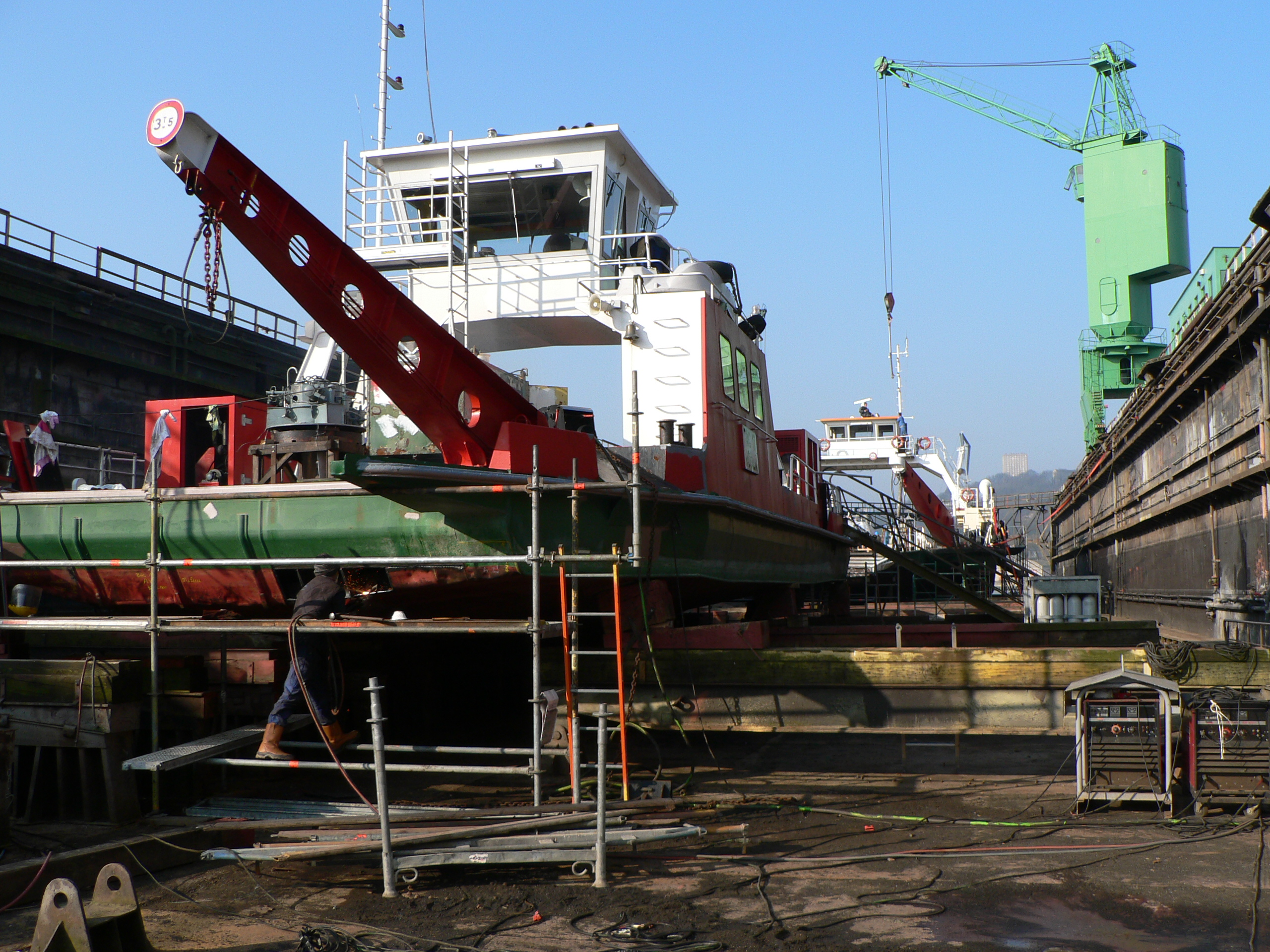 Bac fluvial au premier plan et bac maritime au second plan en arrêt technique dans le dock flottant de Rouen